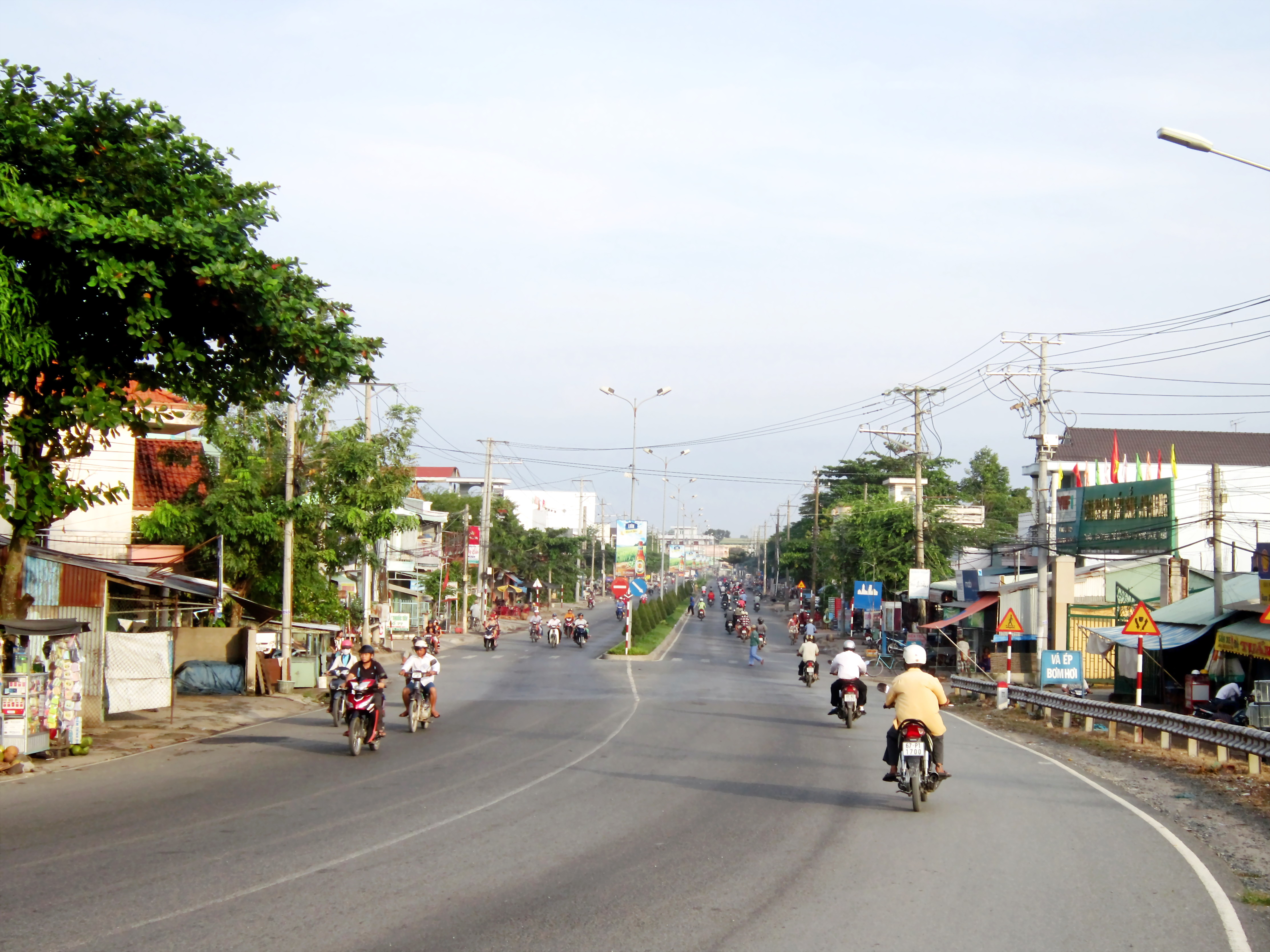 Cảnh ở dốc cầu Cái Sắn thuộc phường Mỹ Thạnh, thành phố Long Xuyên, tỉnh An Giang, Việt Nam.